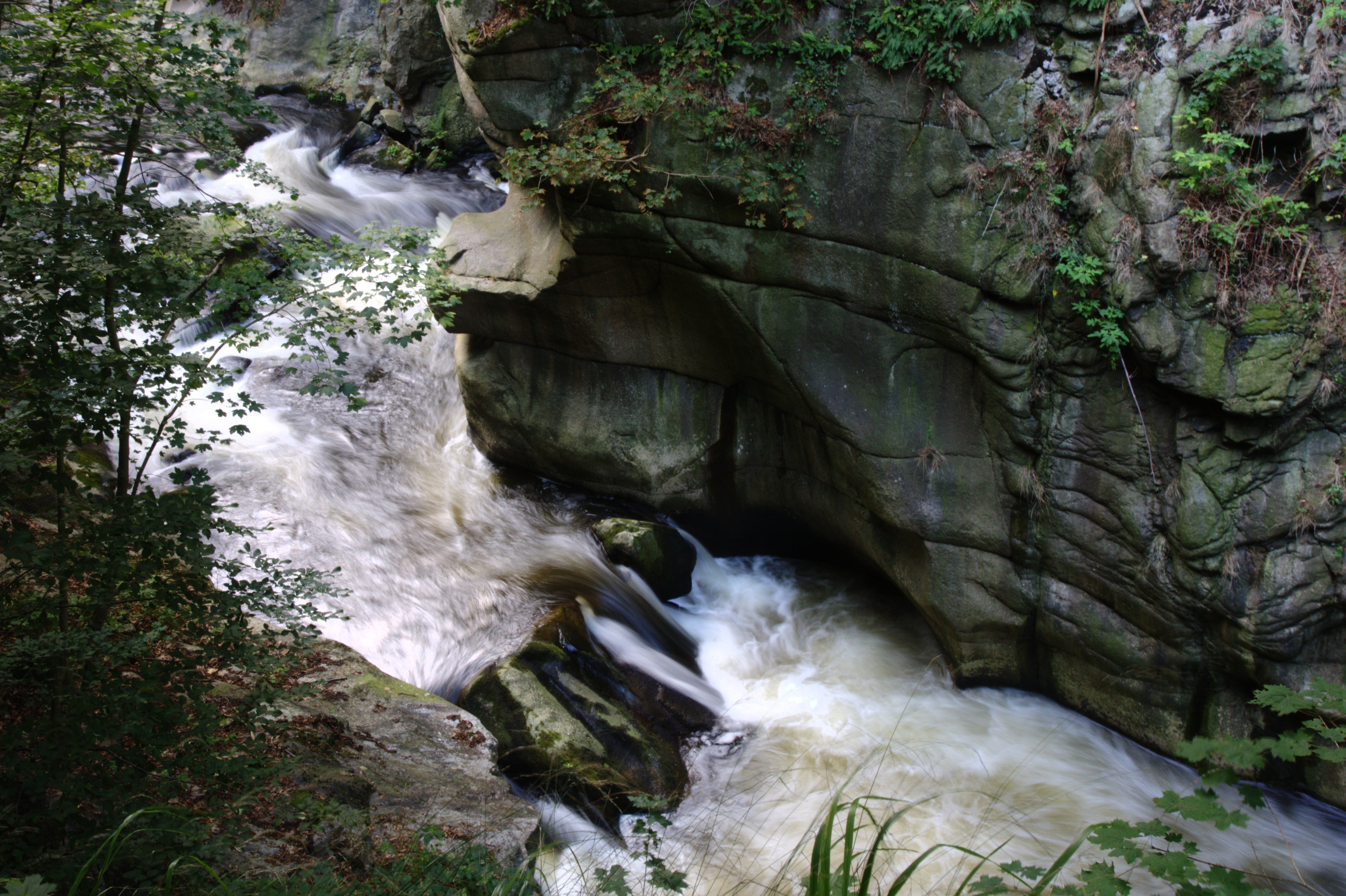 Bodekessel im Bodetal